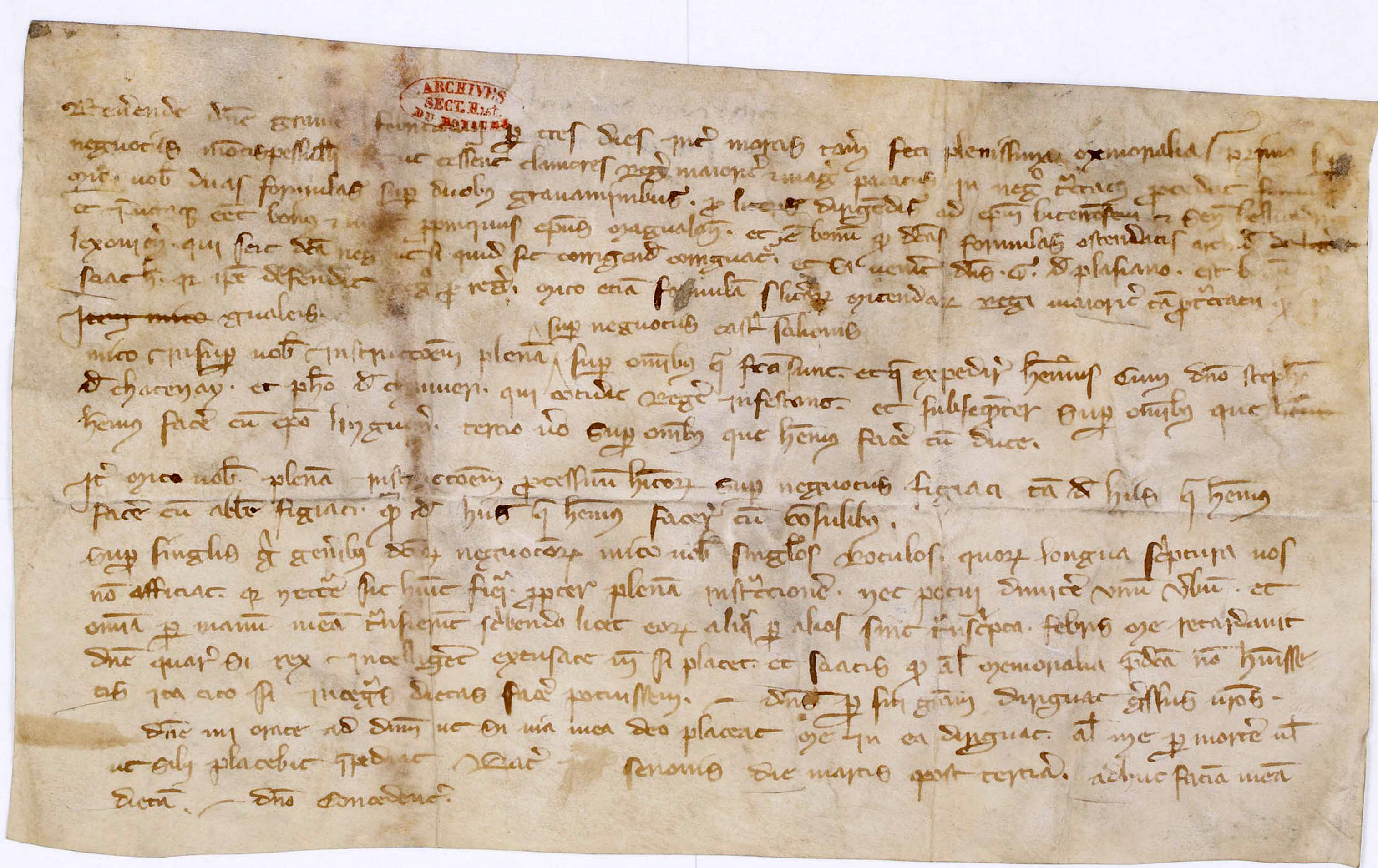 Lettre autographe de Guillaume de Nogaret à Étienne de Suisy relative à plusieurs contentieux et négociations intéressant le roi à Montpellier, à Saulx et à Figeac et annonçant son départ en mission (i.e. celle qui l'amènera à Anagni pour sommer Boniface VIII de comparaître devant un concile), donnée à Sens en mars 1303. Parchemin non scellé, mais portant des traces d'un cachet de cire rouge.